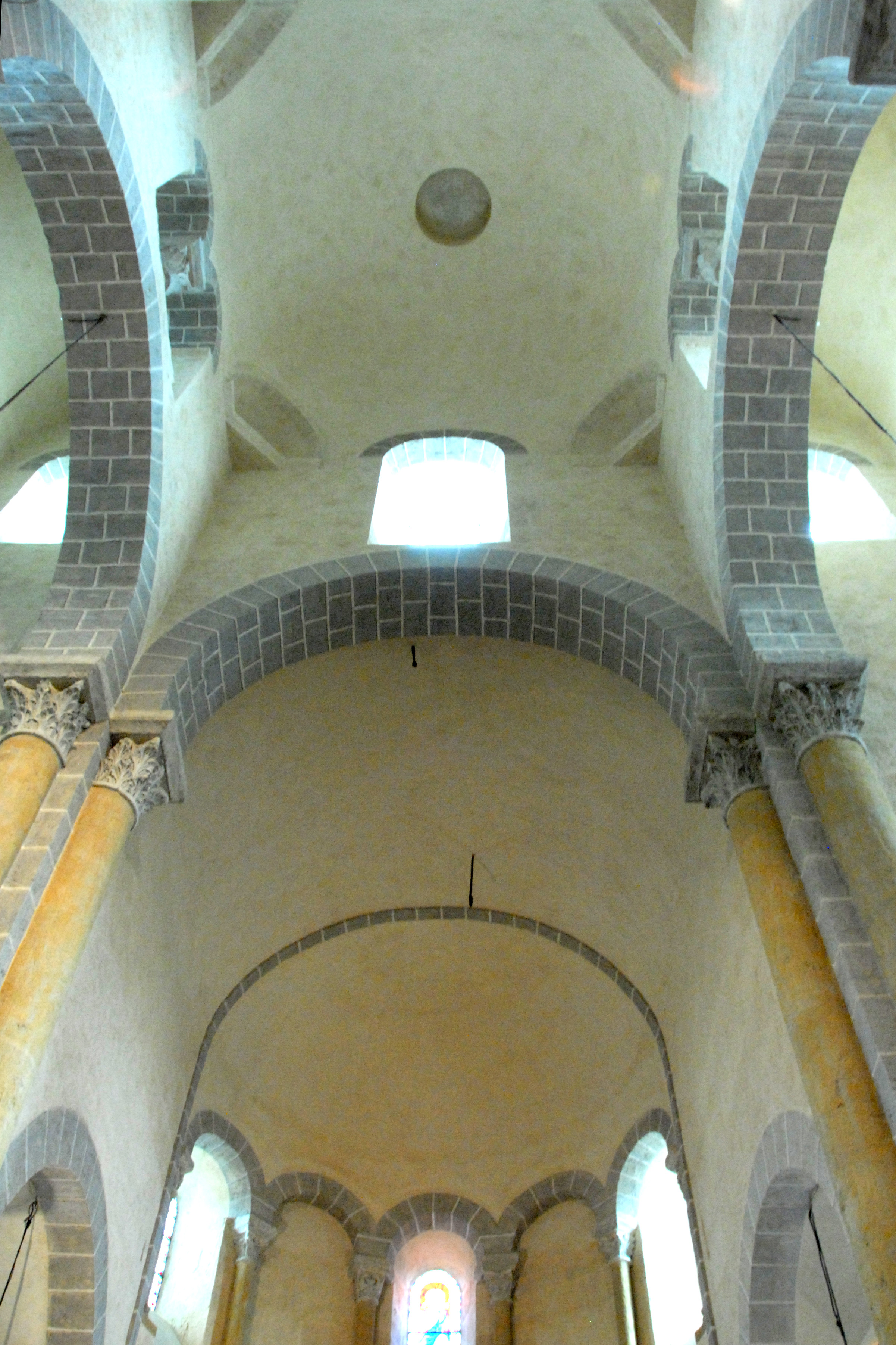 St.-Nectaire, Vierungskuppel + Chorgewölbe